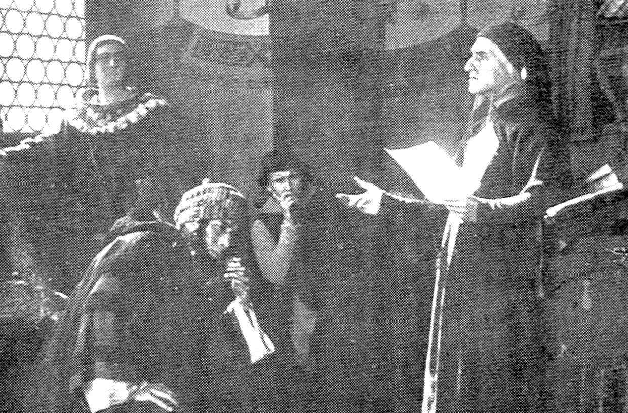 Foto di scena de La mirabile visione, regia di Luigi Sapelli - produz "Tespi Film" - Roma - 1921